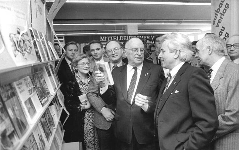 ADN-ZB Grubitzsch 15.3.87 Leipzig: Frühjahrsmesse-Buchmesse 87 Kurt Hager (M.), Mitglied des Politbüros und Sekretär des ZK der SED besuchte bei einem Rundgang der Internationalen Leipziger Buchmesse 87 im Messehaus am Markt den Stand des Aufbau Verlages. Verlagdirektor Elmar Faber (vorn r.), gab den gästen, unter ihnen Klaus Höpke (r.), Stellvertreter des Ministers für Kultur der DDR, und Hermann Kant (M.), Präsident des Schriftstellerverbandes der DDR , Erläuterungen.